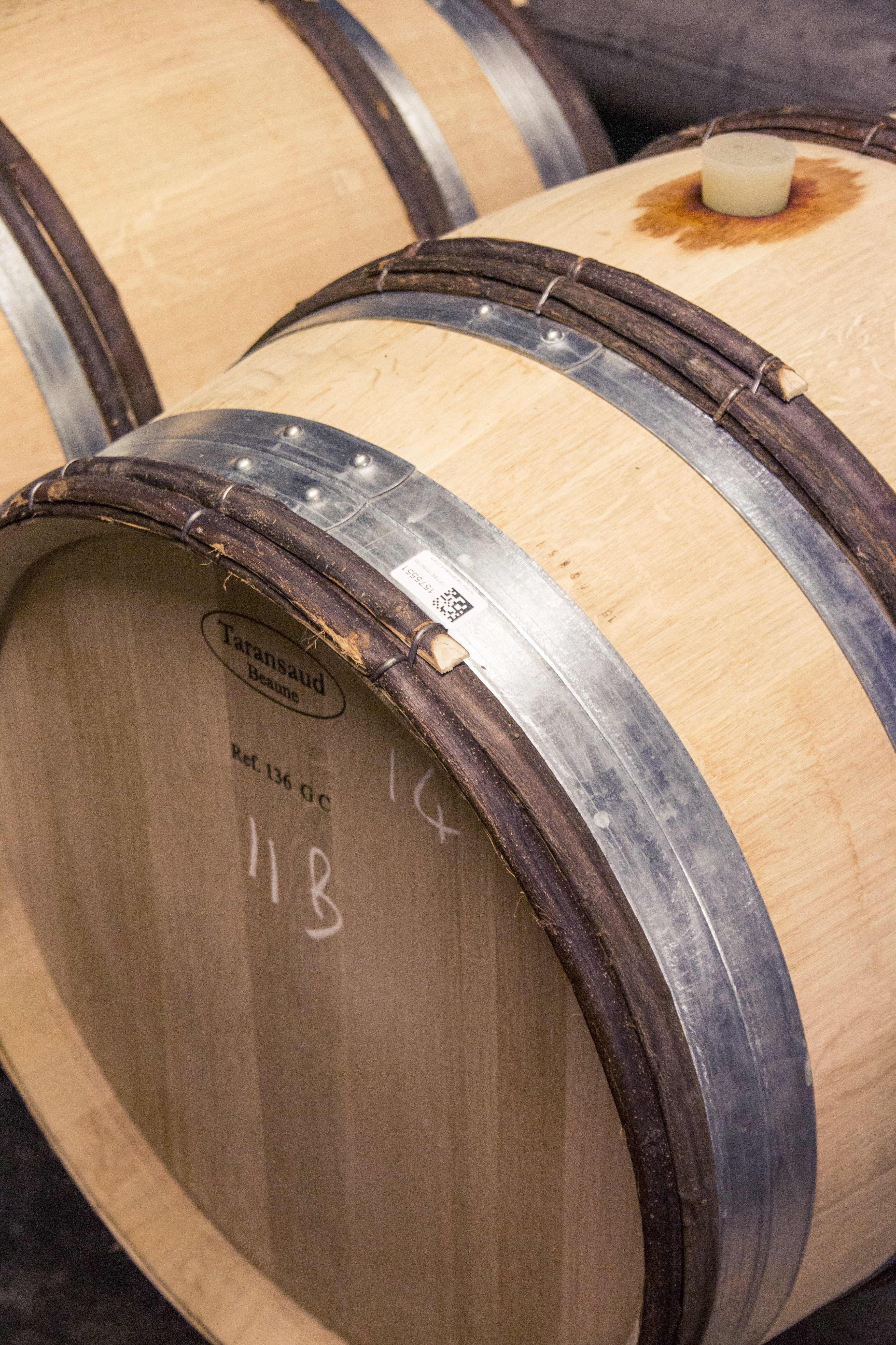 Cercles en chataigner servant au roulage et en métal servant au maintient des douelles